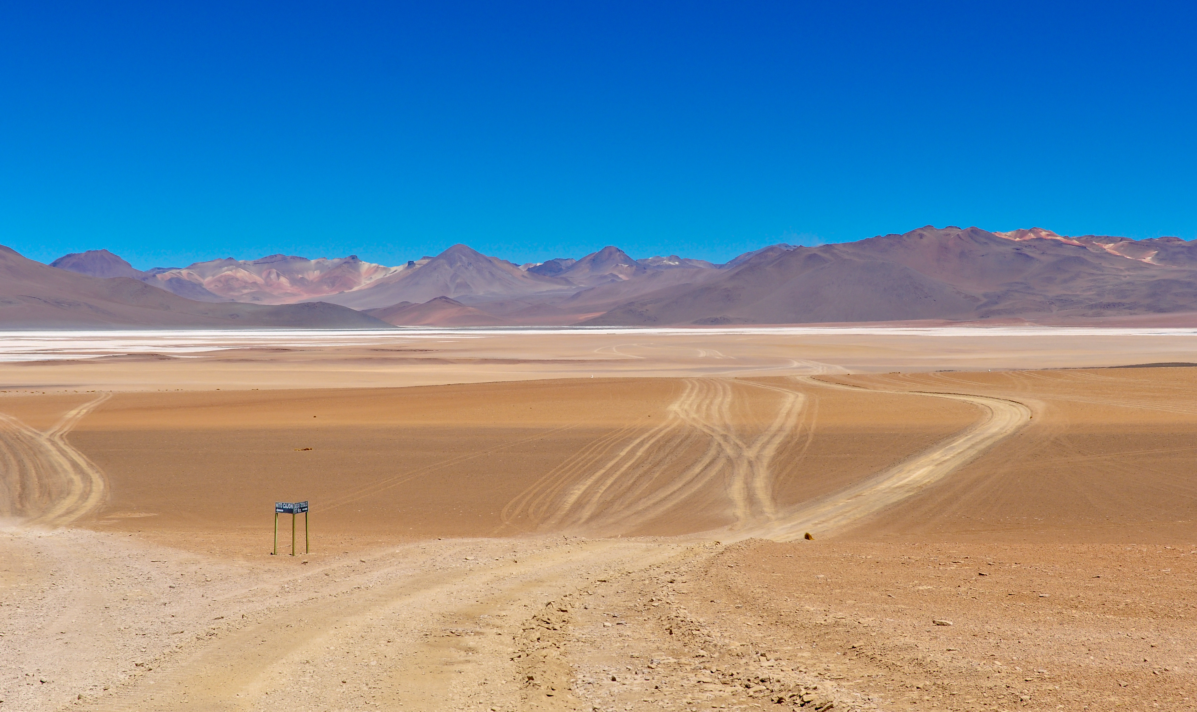 Salar de Chalviri, Bolivia.